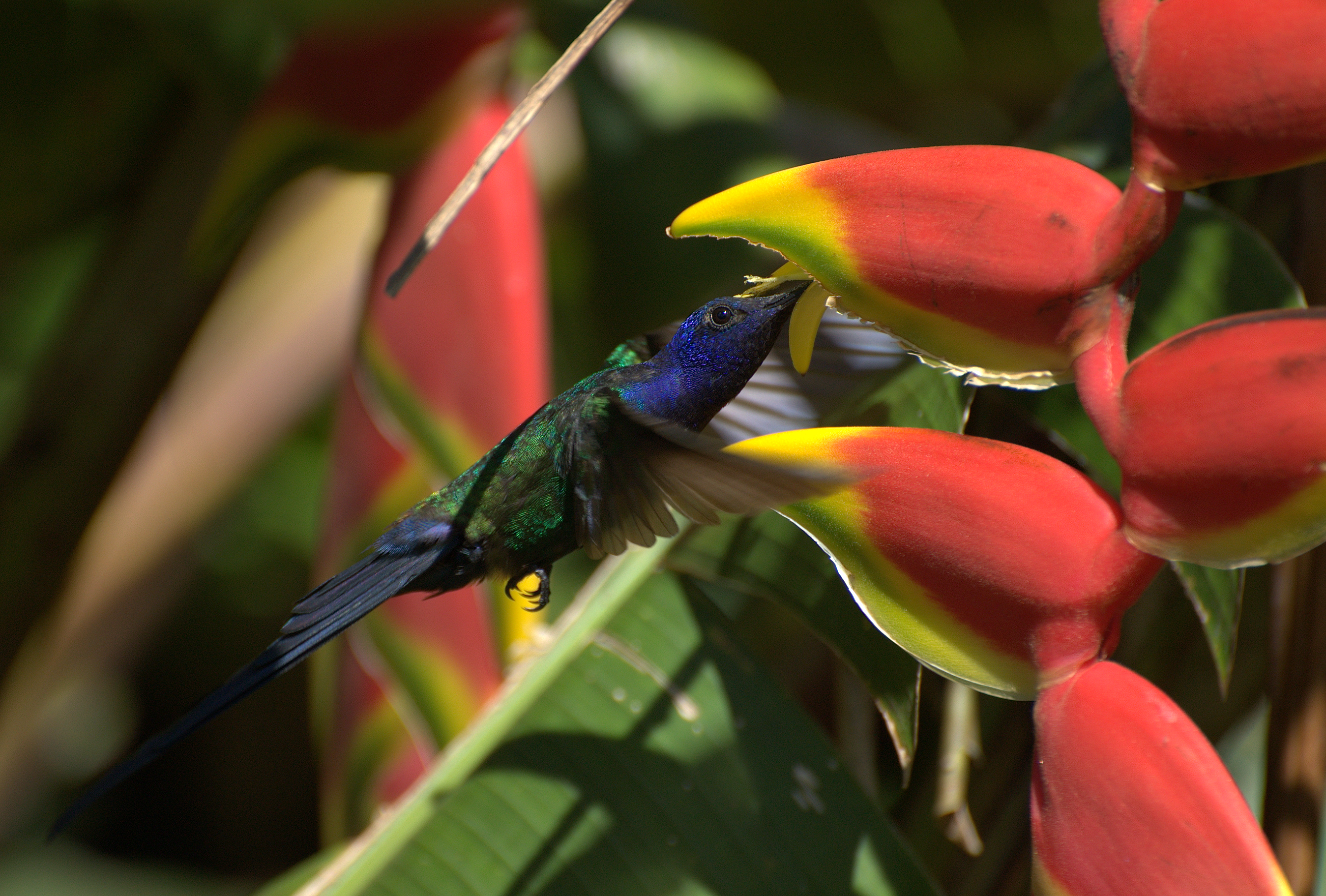 EPR - VIVEIRO DE MUDAS NATIVAS - Fazenda Vô-Vó - Piraju-SP .br/index.php.htm